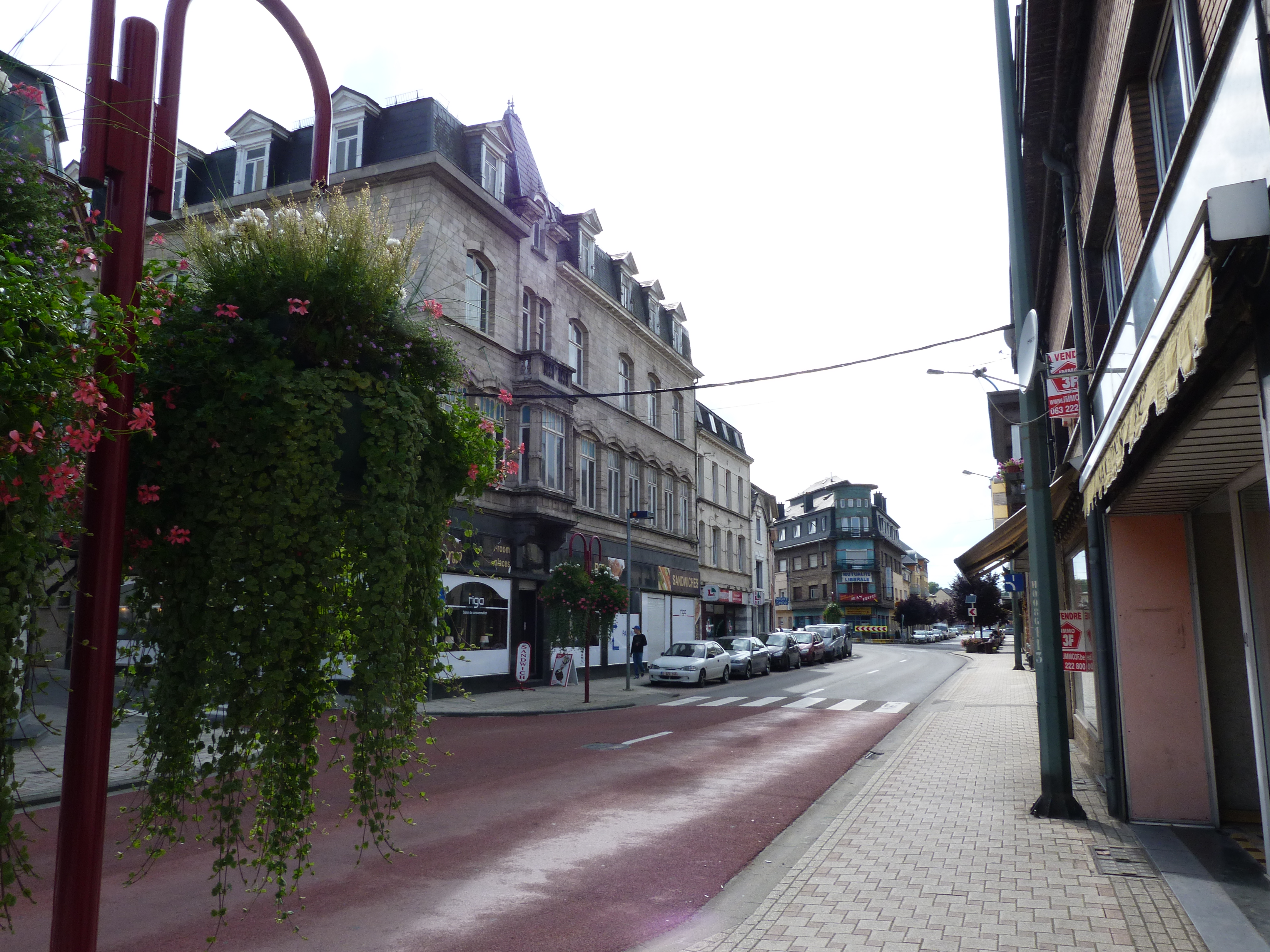 Athus (centre)